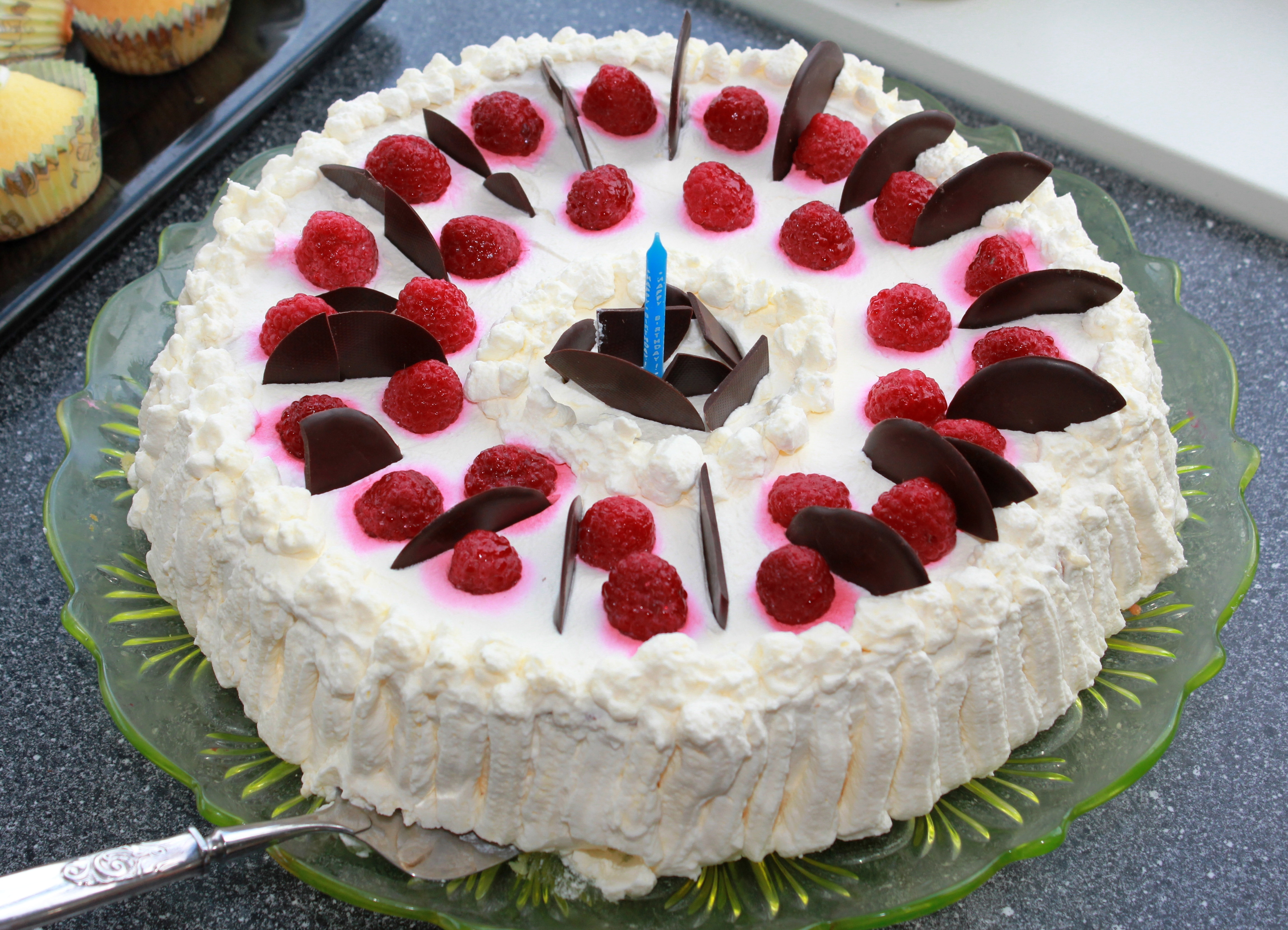 Bringebærbløtkake